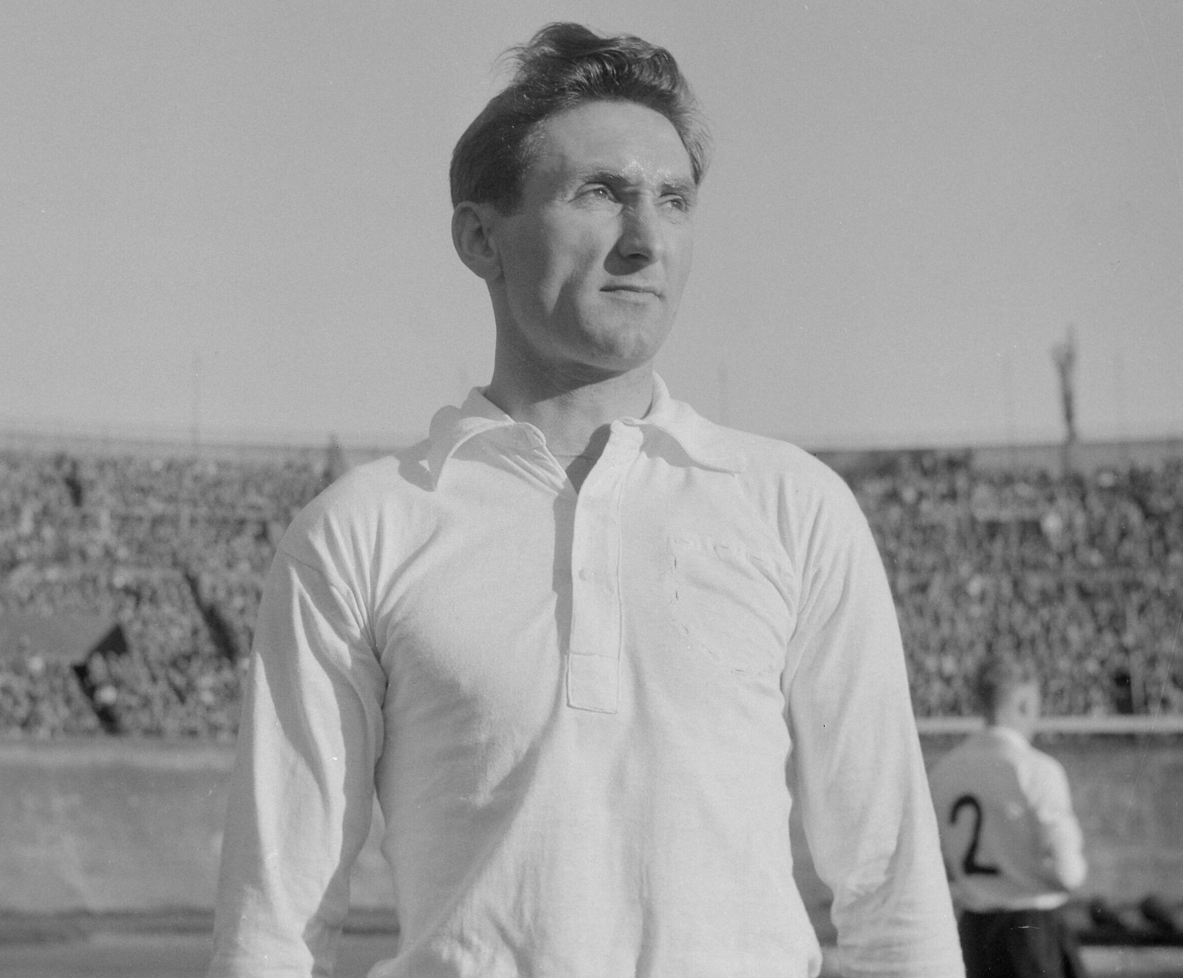 Photographie de Faas Wilkes par Wim van Rossem / Anefo (1955).